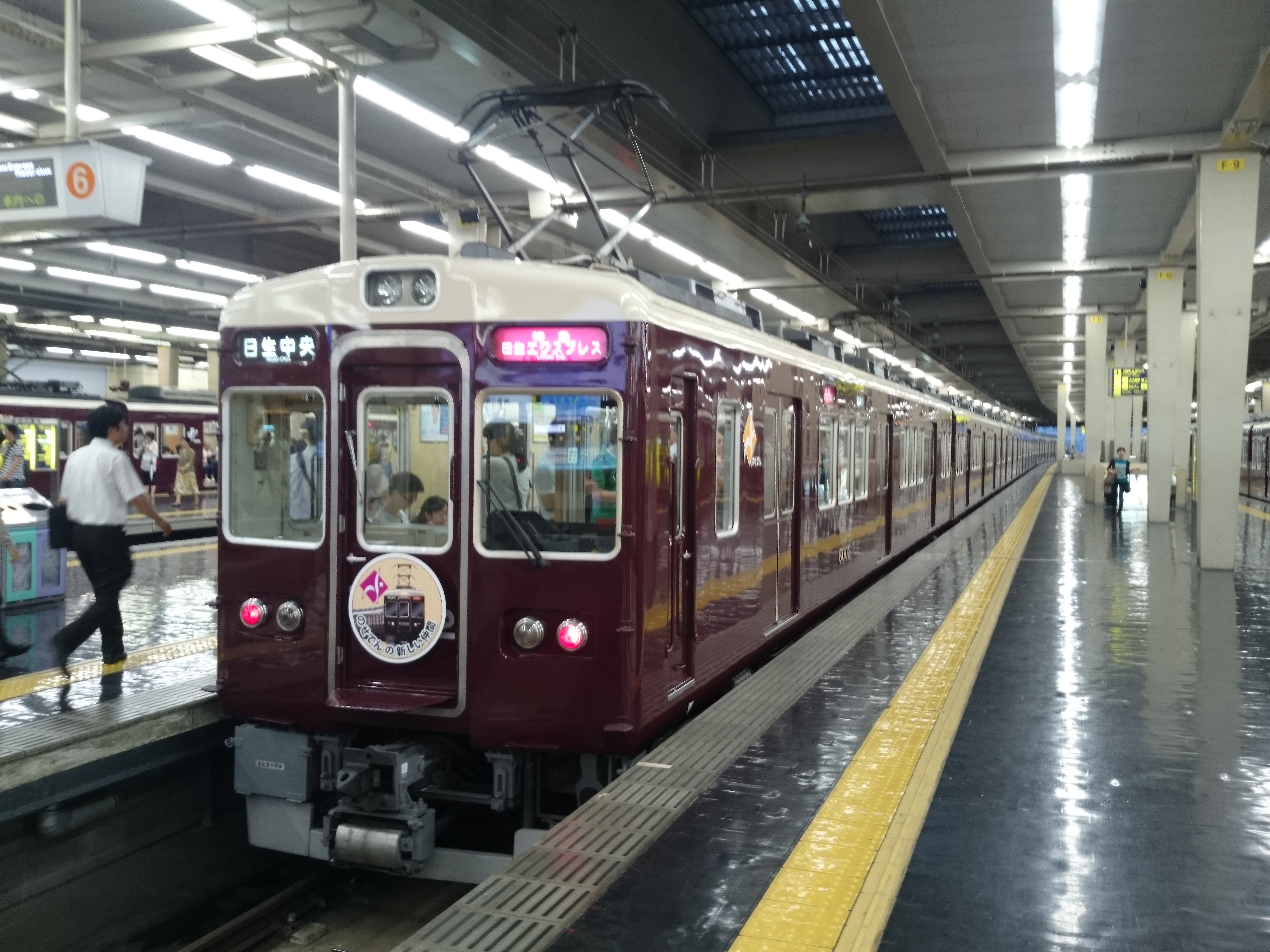 能勢電鉄6000系（旧 阪急6000系）阪急梅田駅にて。